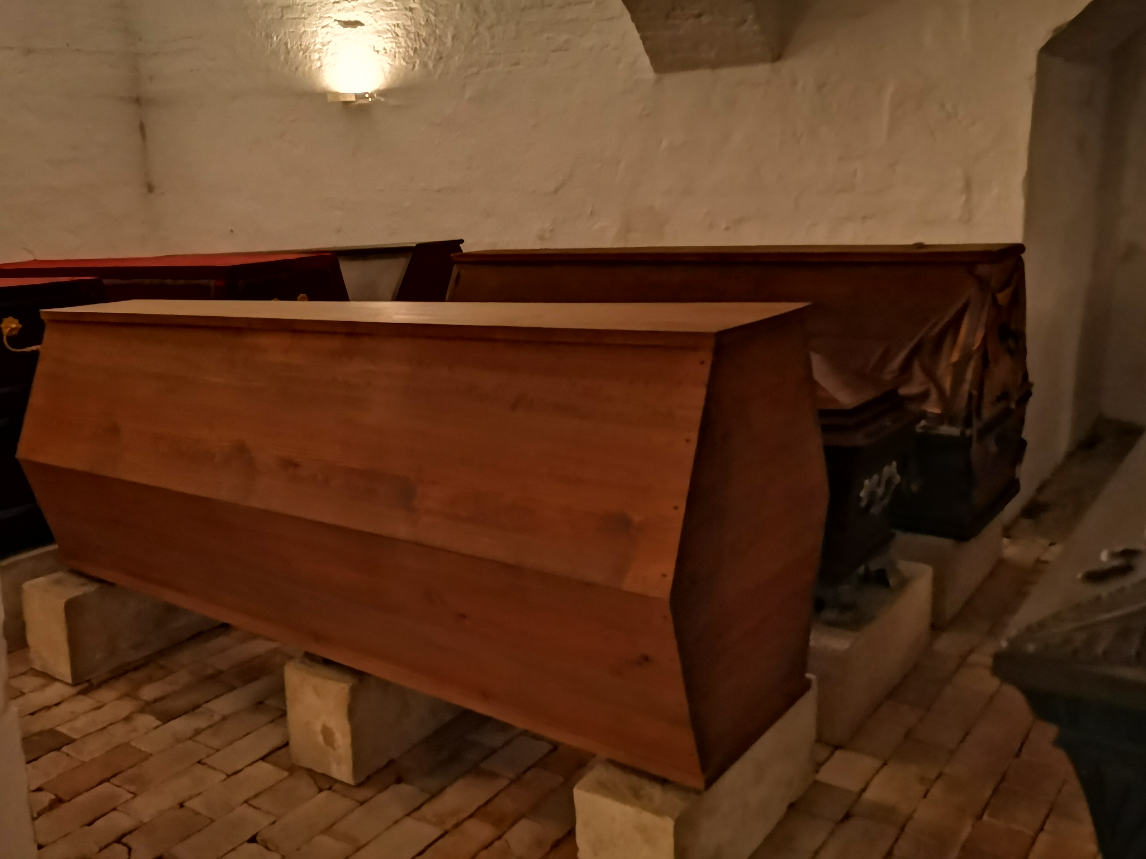 Fürstengruft Weimar, Särge von Erbgroßherzogin Pauline (1852–1904), Erbgroßherzog Carl August (1844–1894) und Prinzessin Anna Amalia Maria (1828–1864) (vorn von links nach rechts); Großherzog Carl Alexander (1818–1901), Großherzogin Sophie (1824–1897), Prinz Alexander (1857–1891) (hinten von links nach rechts)